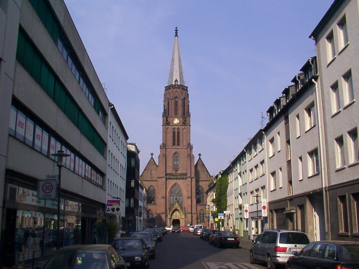 Krefeld: Stephanstraße mit katholischer Pfarrkirche Sankt Stephan.